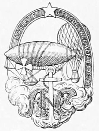 Logo of Aero-Club de France